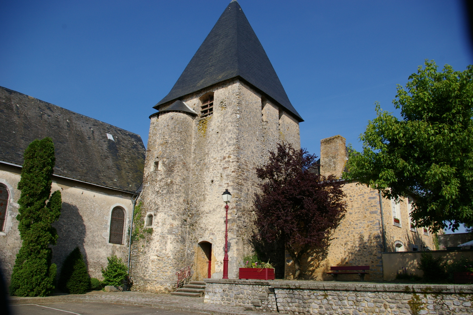 L'église Notre-Dame de Saulges (Mayenne)